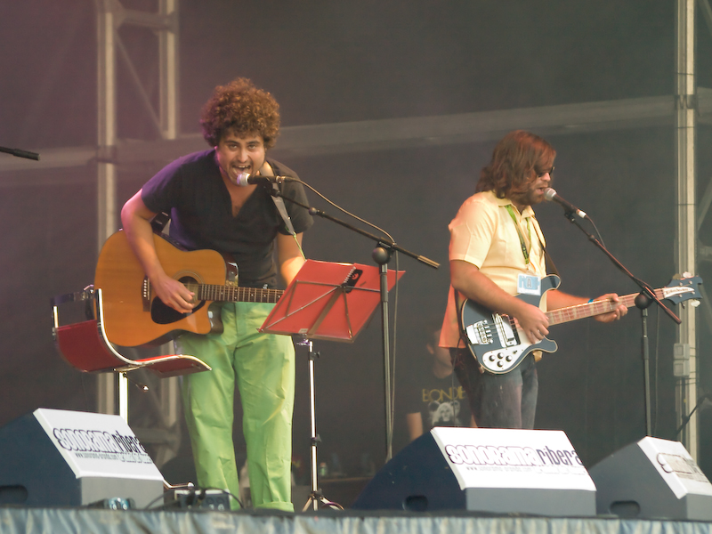 El grupo español Manos de Topo, durante una actuación en el Sonorama Ribera 2009 (Aranda del Duero, Burgos).